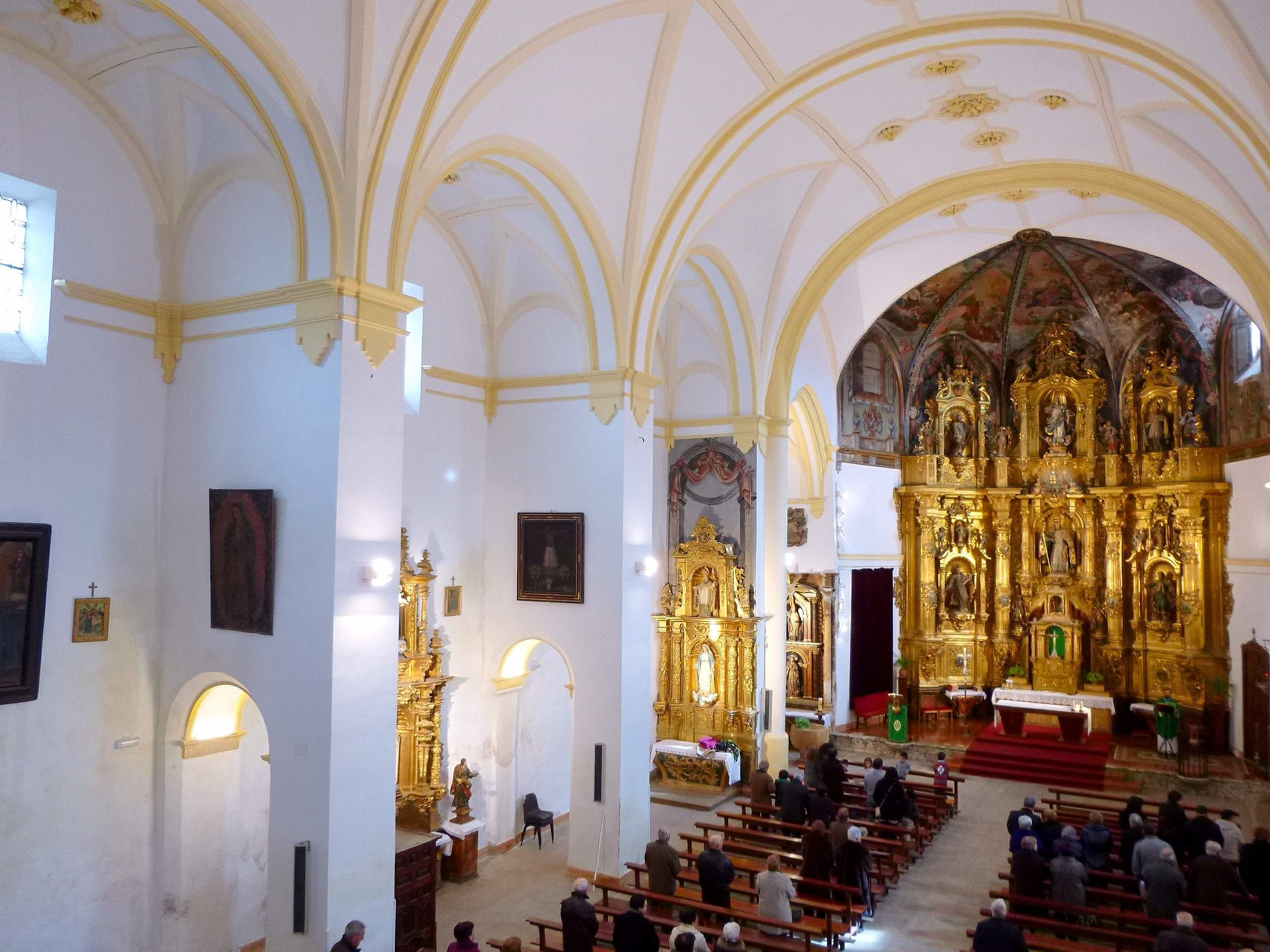 Iglesia de San Pedro (Belorado, Burgos)